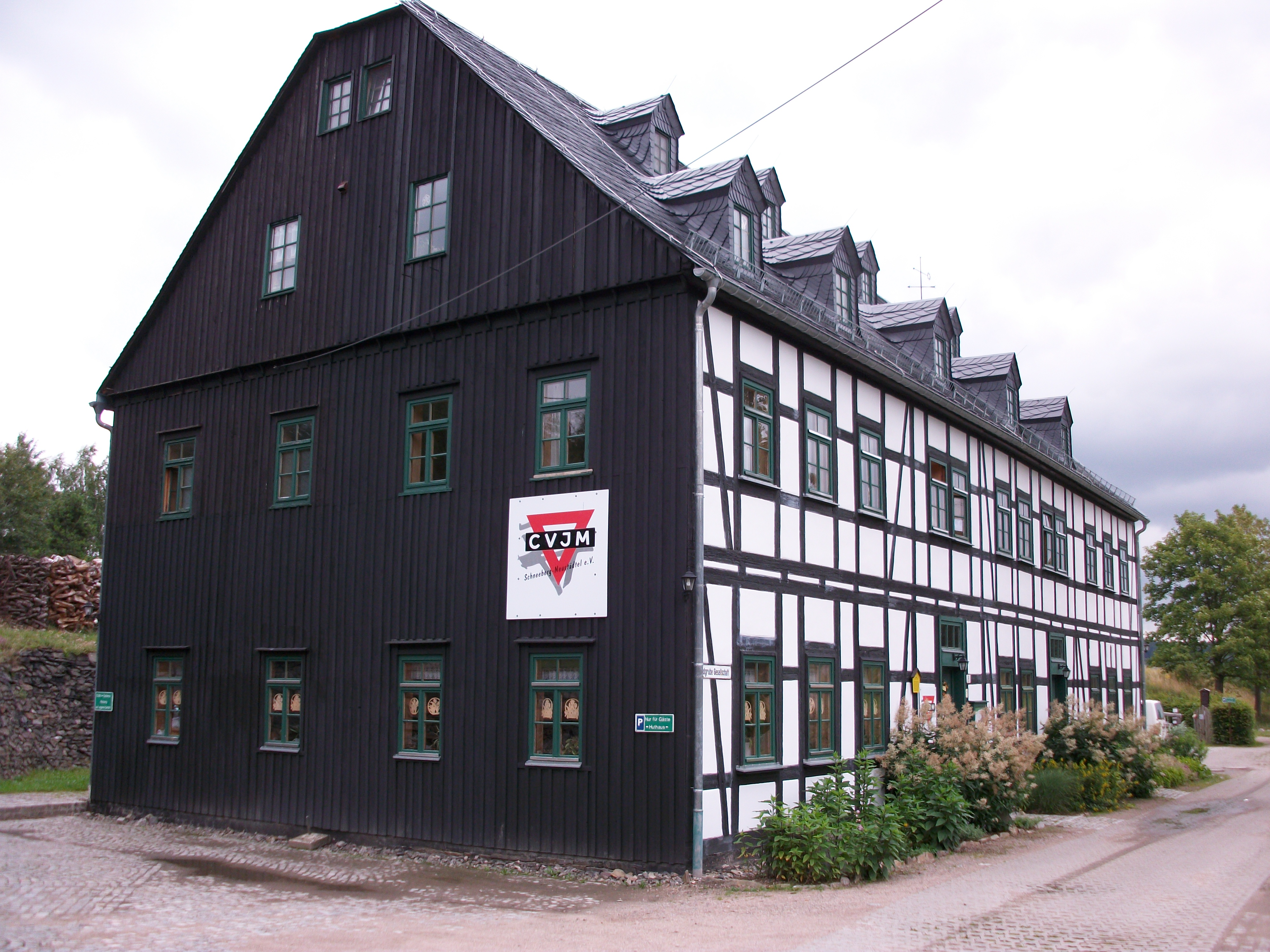 Ein Gebäude der Fundgrube Gesellschaft aus Schneeberg